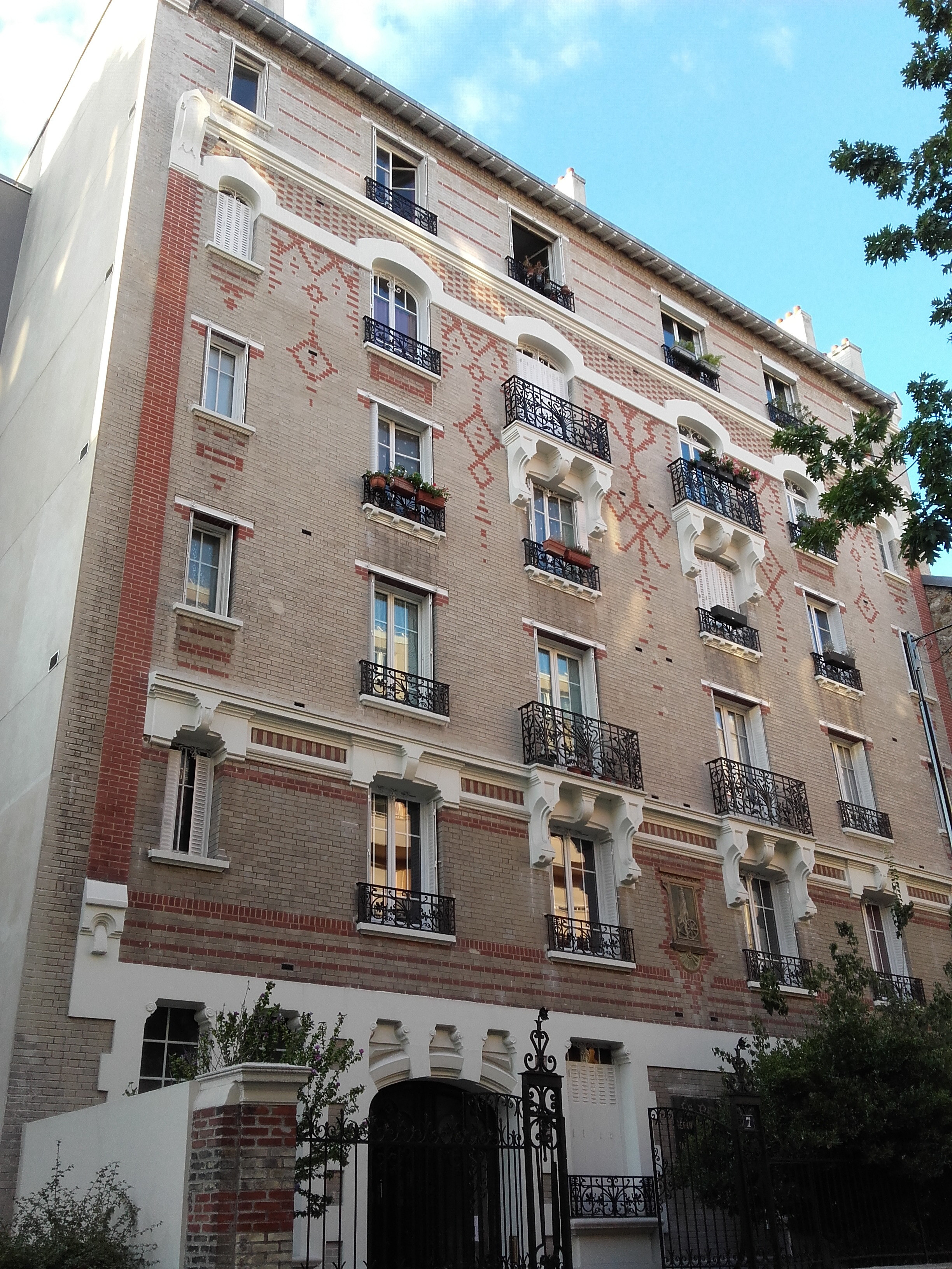 immeuble inscrit sur la base Mérimée